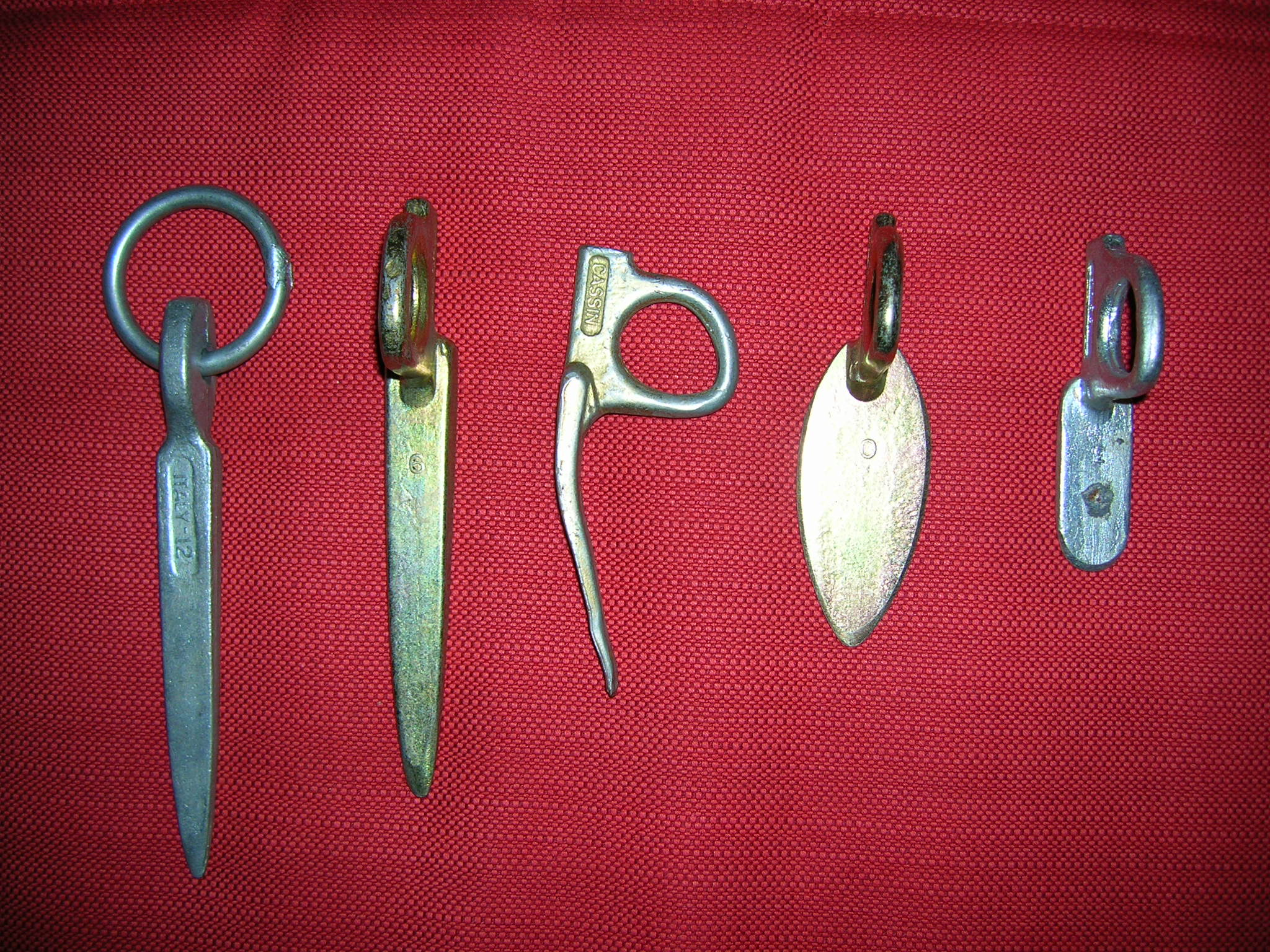 Foto di chiodi da roccia in acciaio dolce. Foto mia.